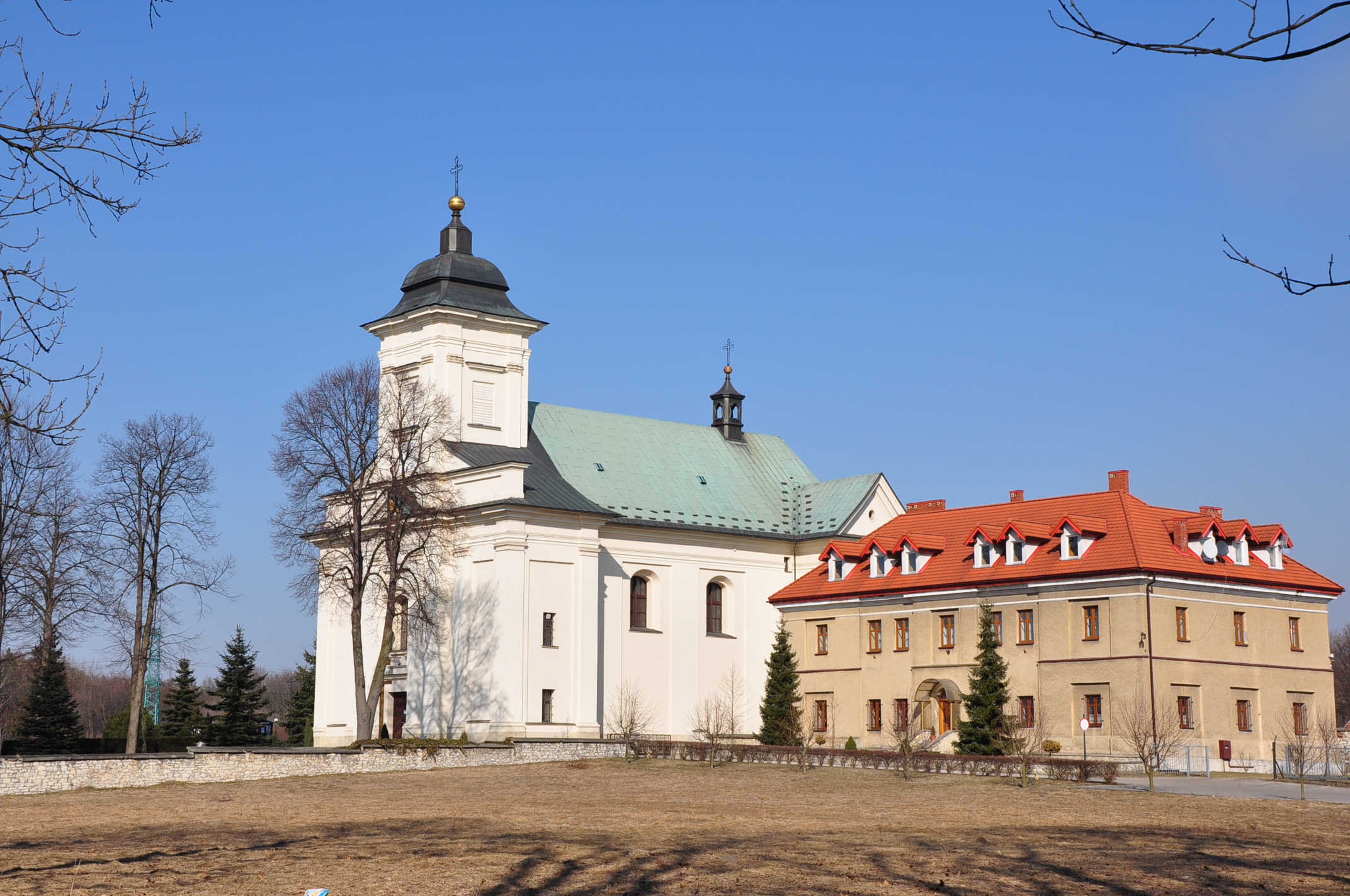 Bobrek. Kościół p.w.Trójcy Przenajświętszej.